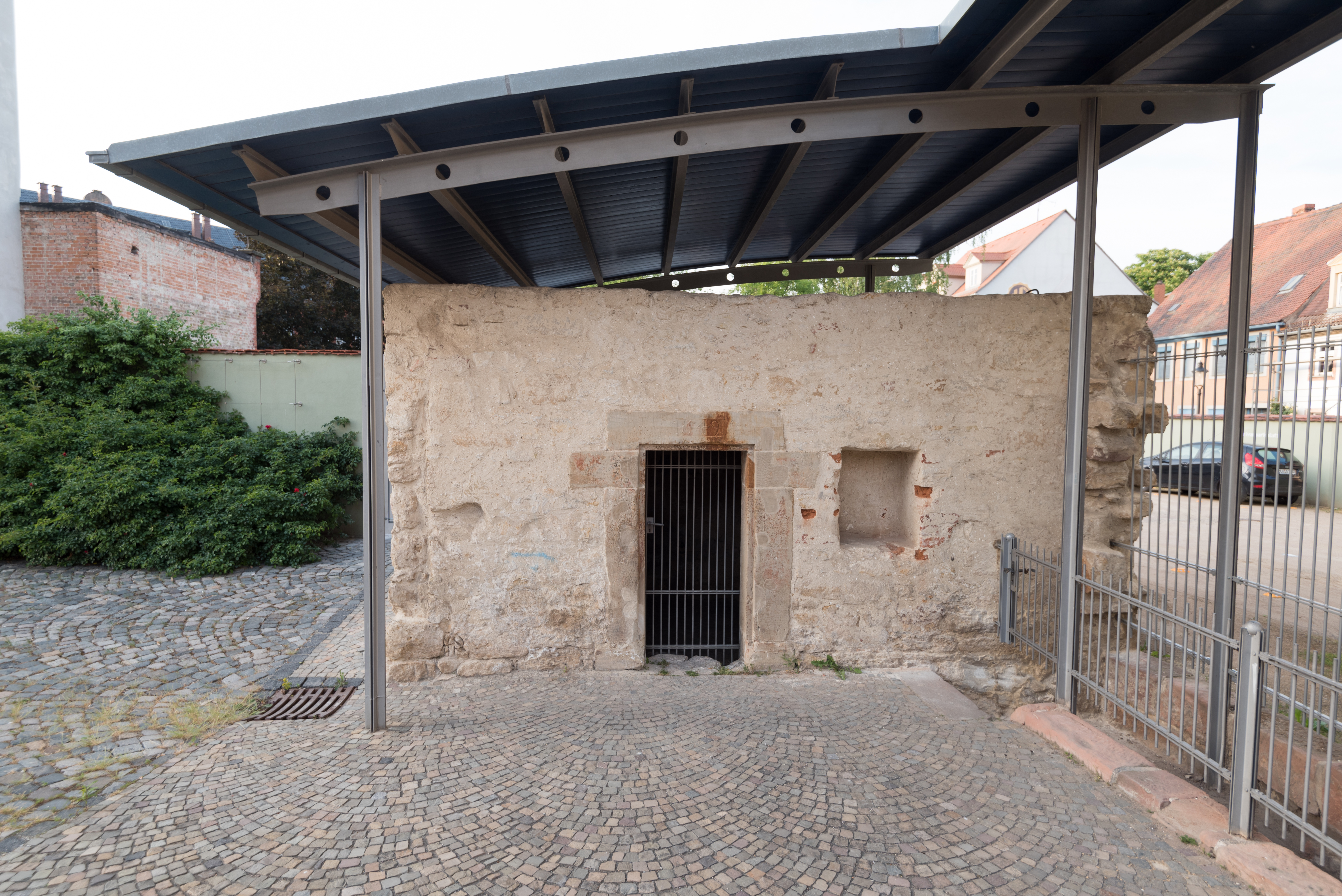 Naumburg (Saale), Rosengarten 7